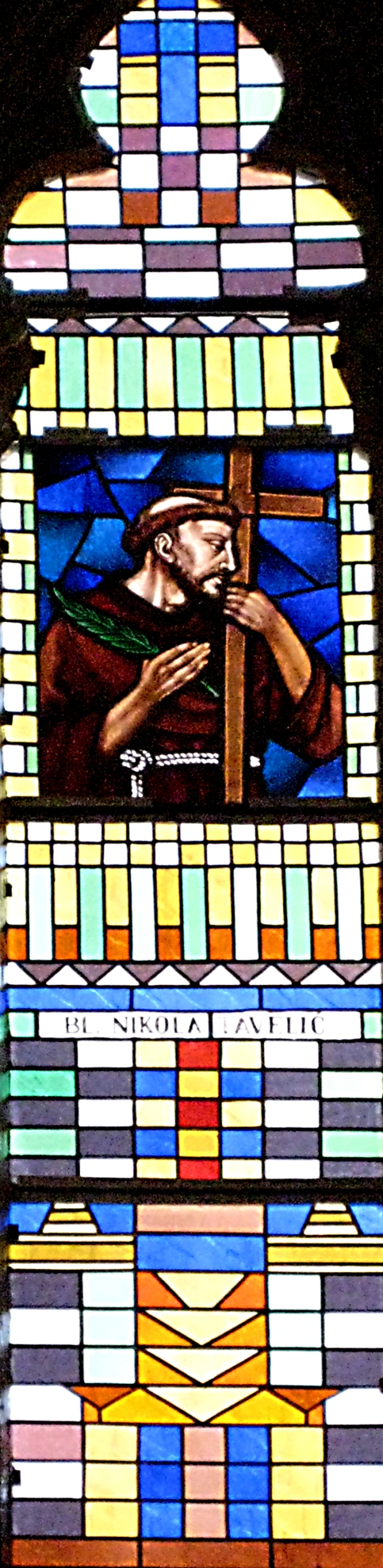 vitraj blaženog Nikole Tavelića u crkvi Gospe Lurdske, Rijeka